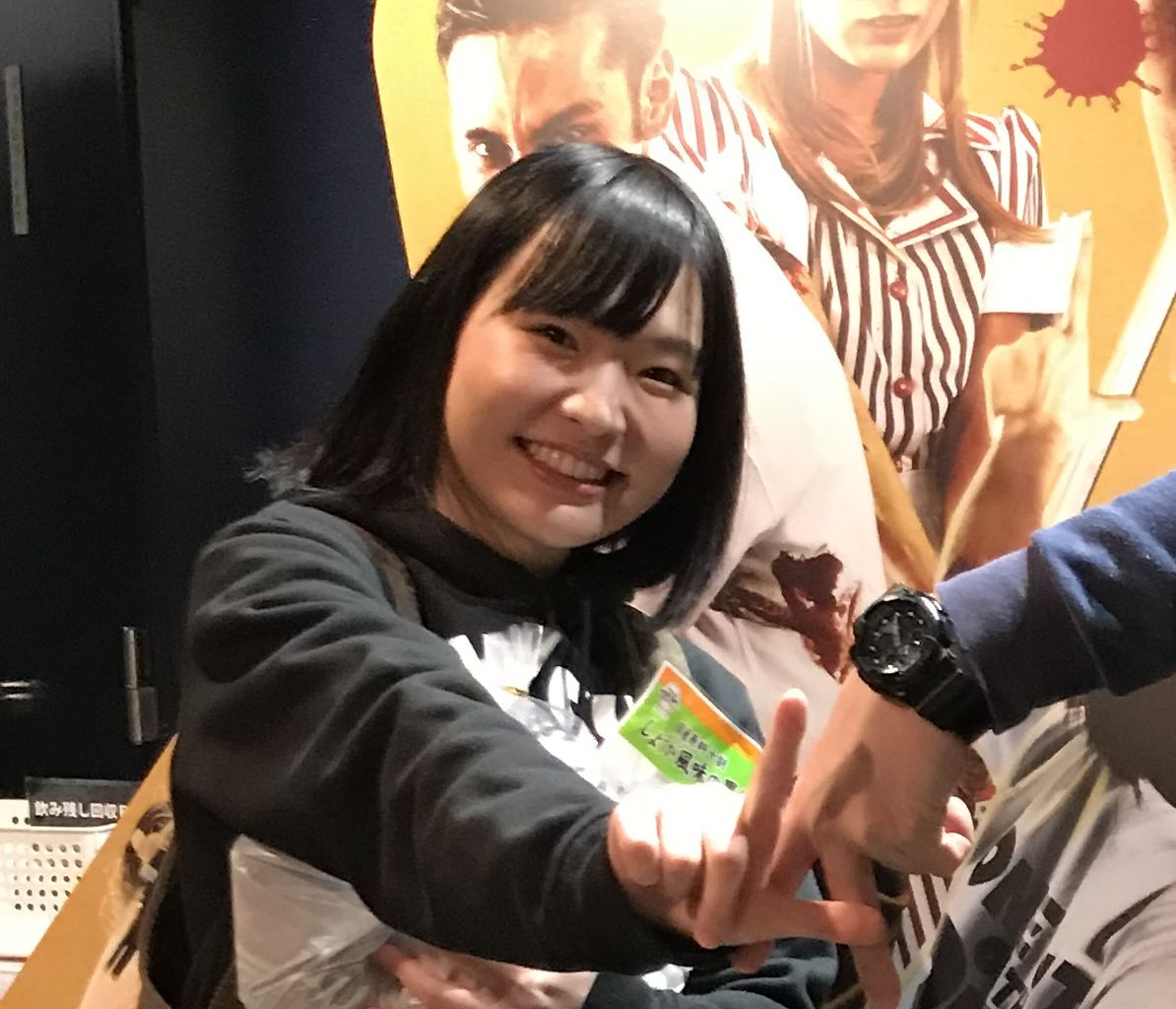 女優・浅森咲希奈